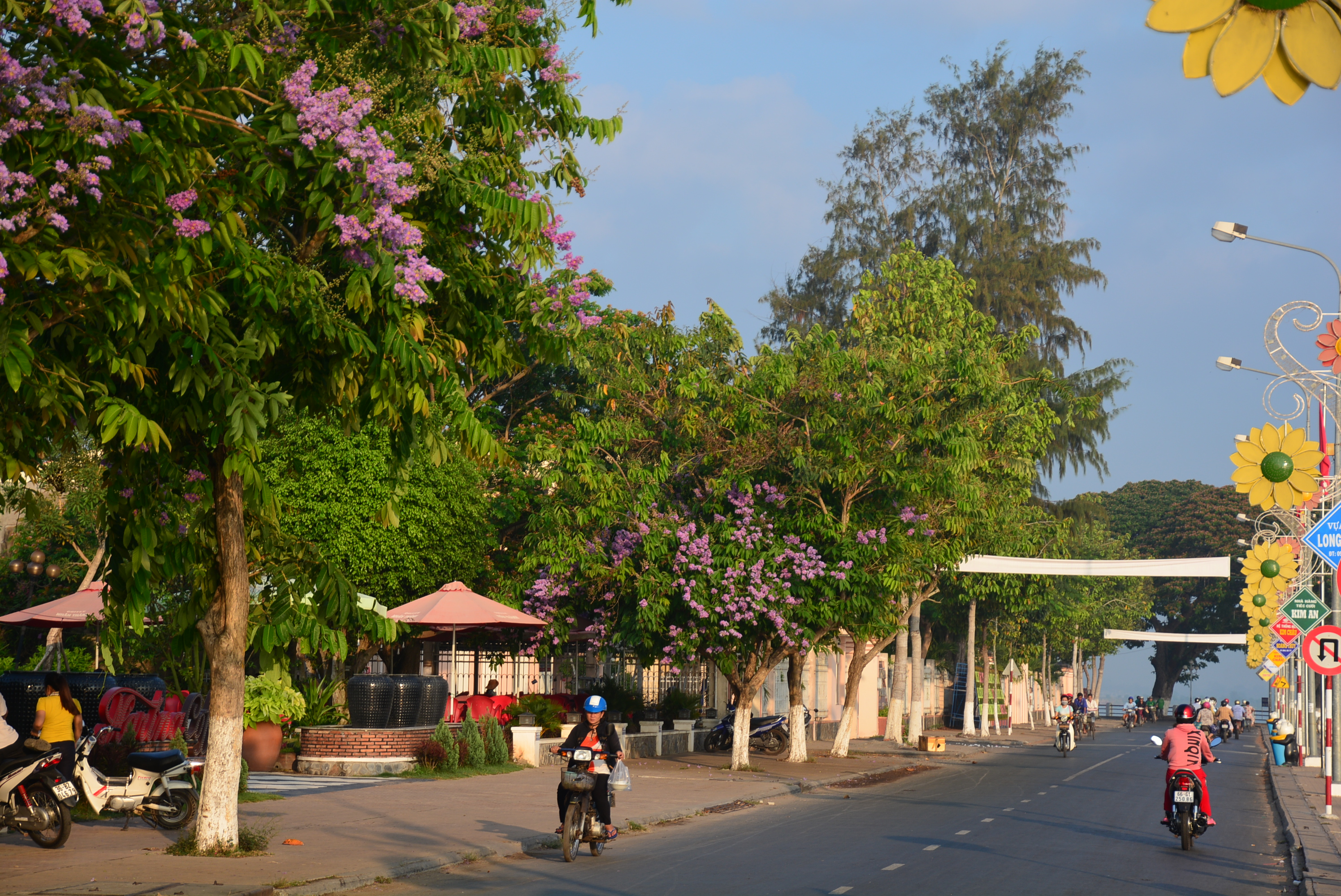 Duong Tran Hung dao, TL 954. Long Châu, tx. Tân Châu, An Giang, Việt Nam